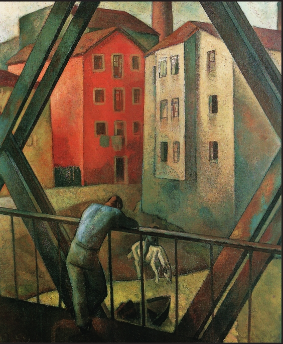 Burtzeñako zubia, Aurelio Arteta. Barakaldoko Burtzeña auzoan, Cadagua ibaiaren gainean dagoen zubia ageri da.